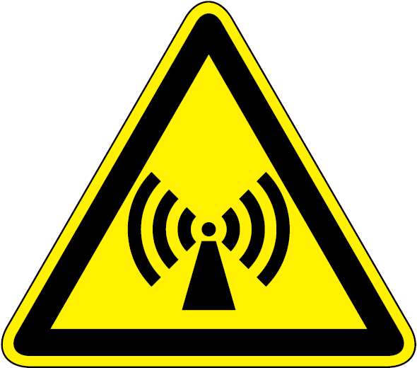 Symbol für Nichtionisierende Strahlung